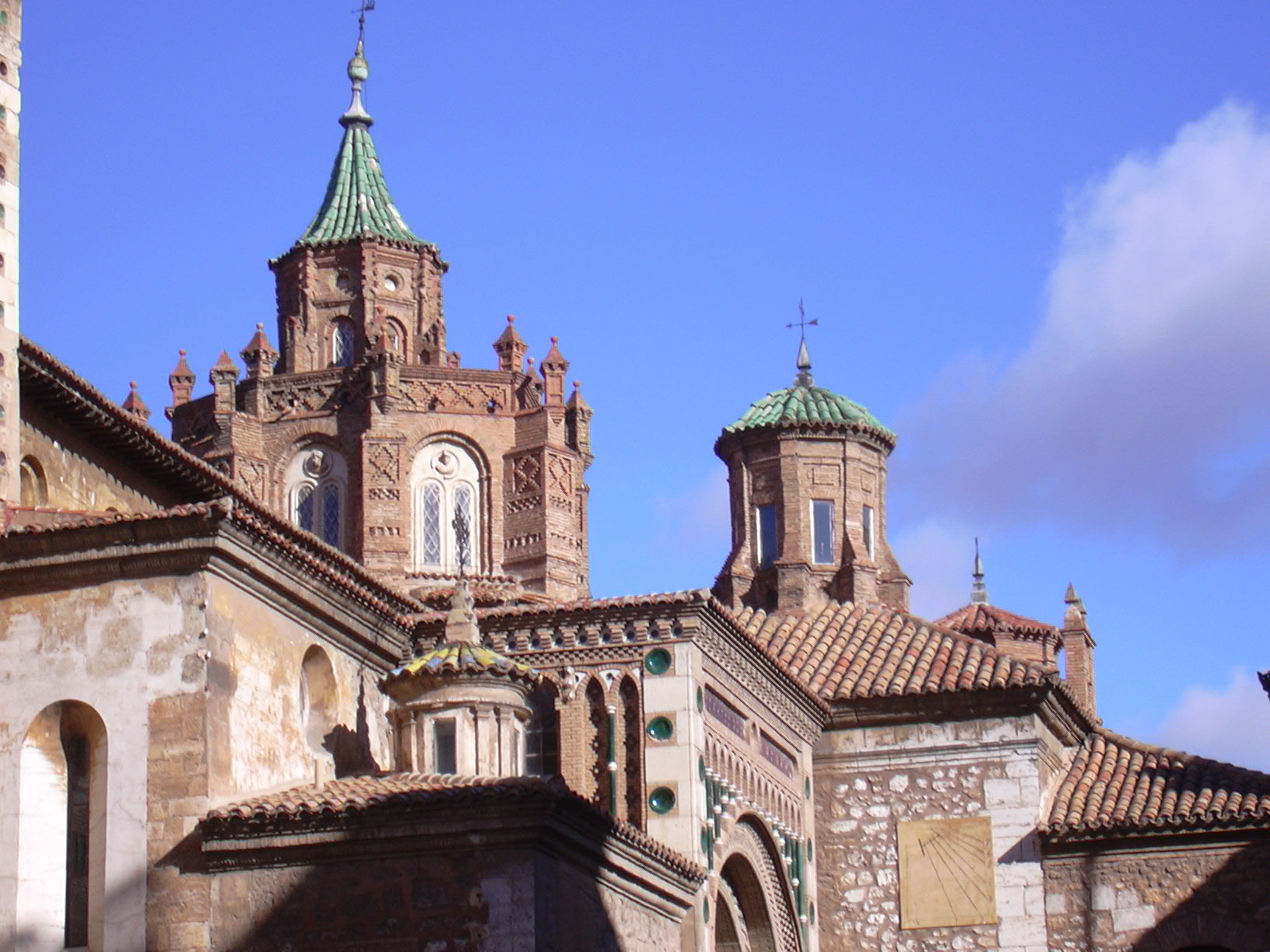 Teruel - Cimborrio de la catedral